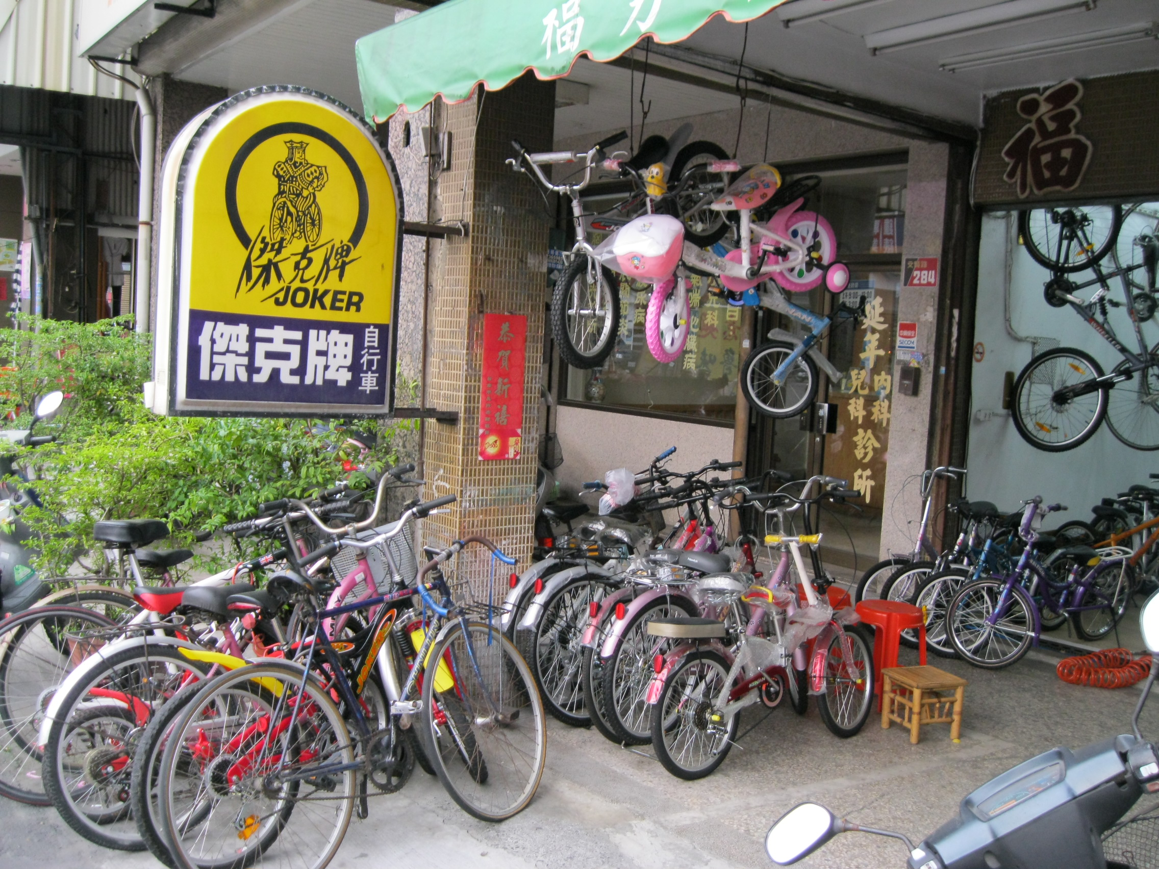 臺灣臺南市北區文賢路腳踏車行傑克牌自行車招牌。